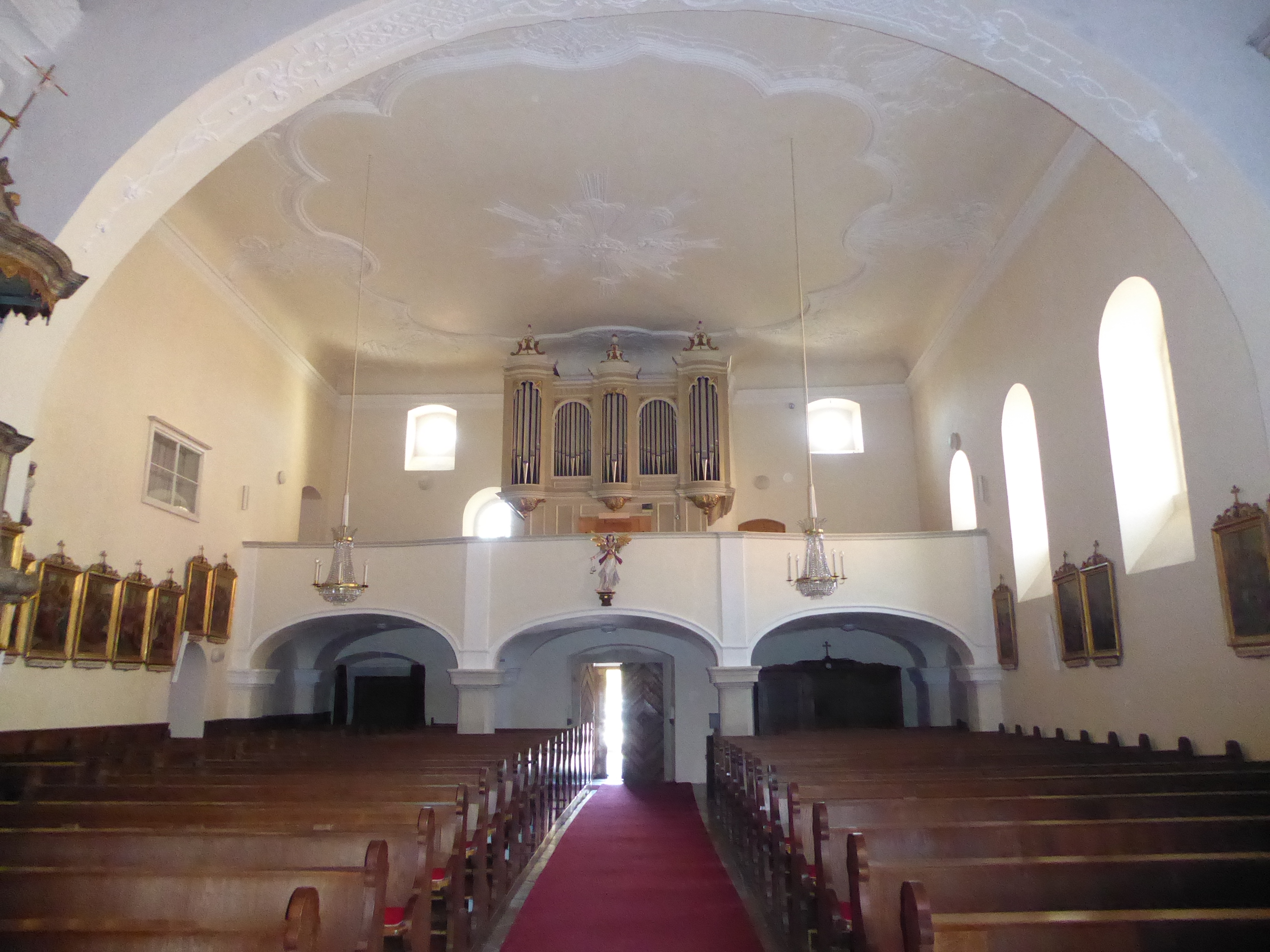 Pfarr- und Marktkirche hll. Simon und Thaddäus, Hauptplatz 1, Gars am Kamp, Niederösterreich - Orgelempore, Orgel von Gerhard Hradetzky, 1975